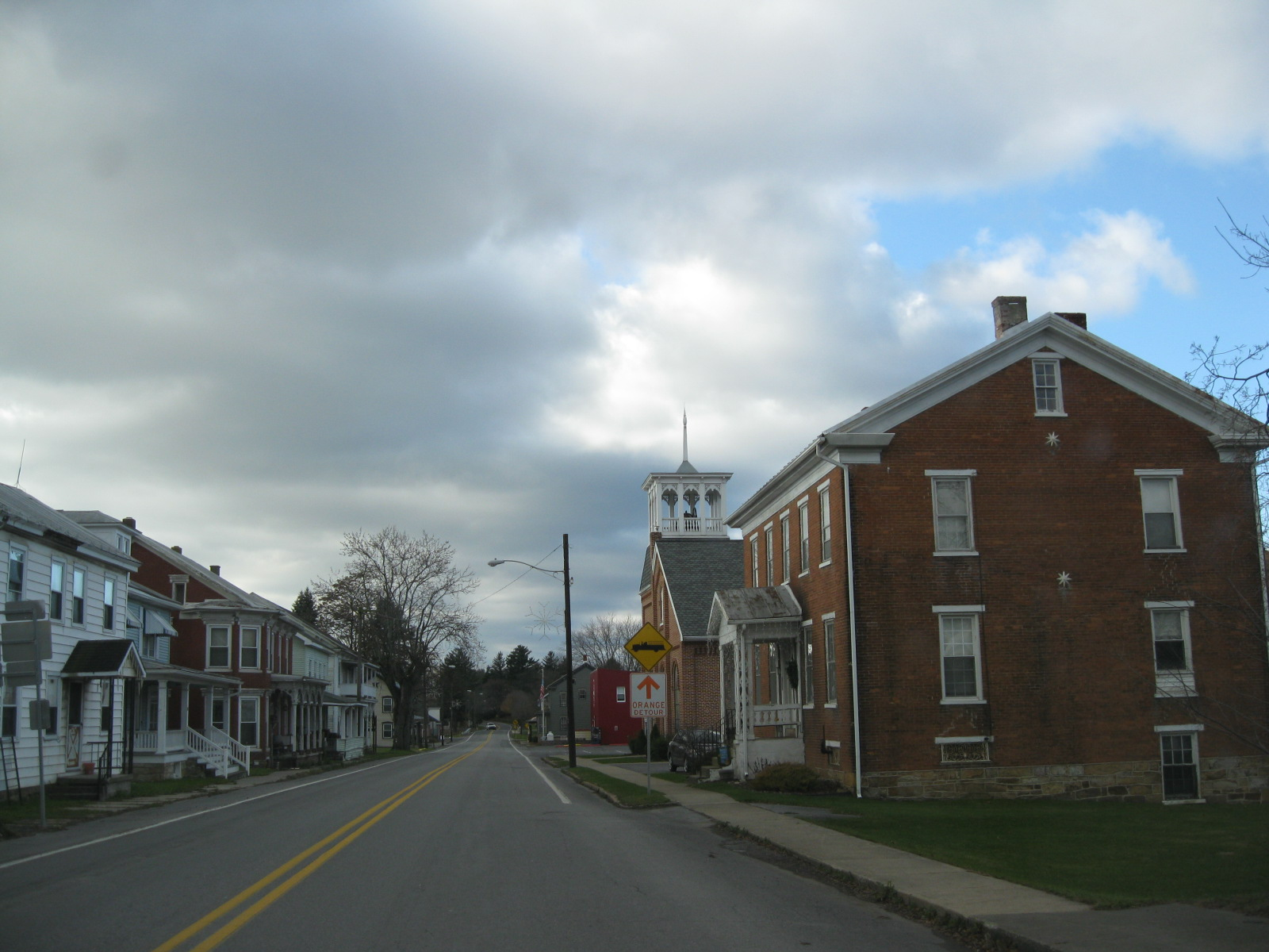 McAlisterville, Pennsylvania